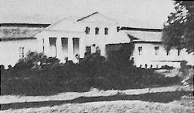 Беларуская (тарашкевіца): Магілёўцы (Mahiloŭcy), сядзіба Быхаўцаў (Bychaviec)